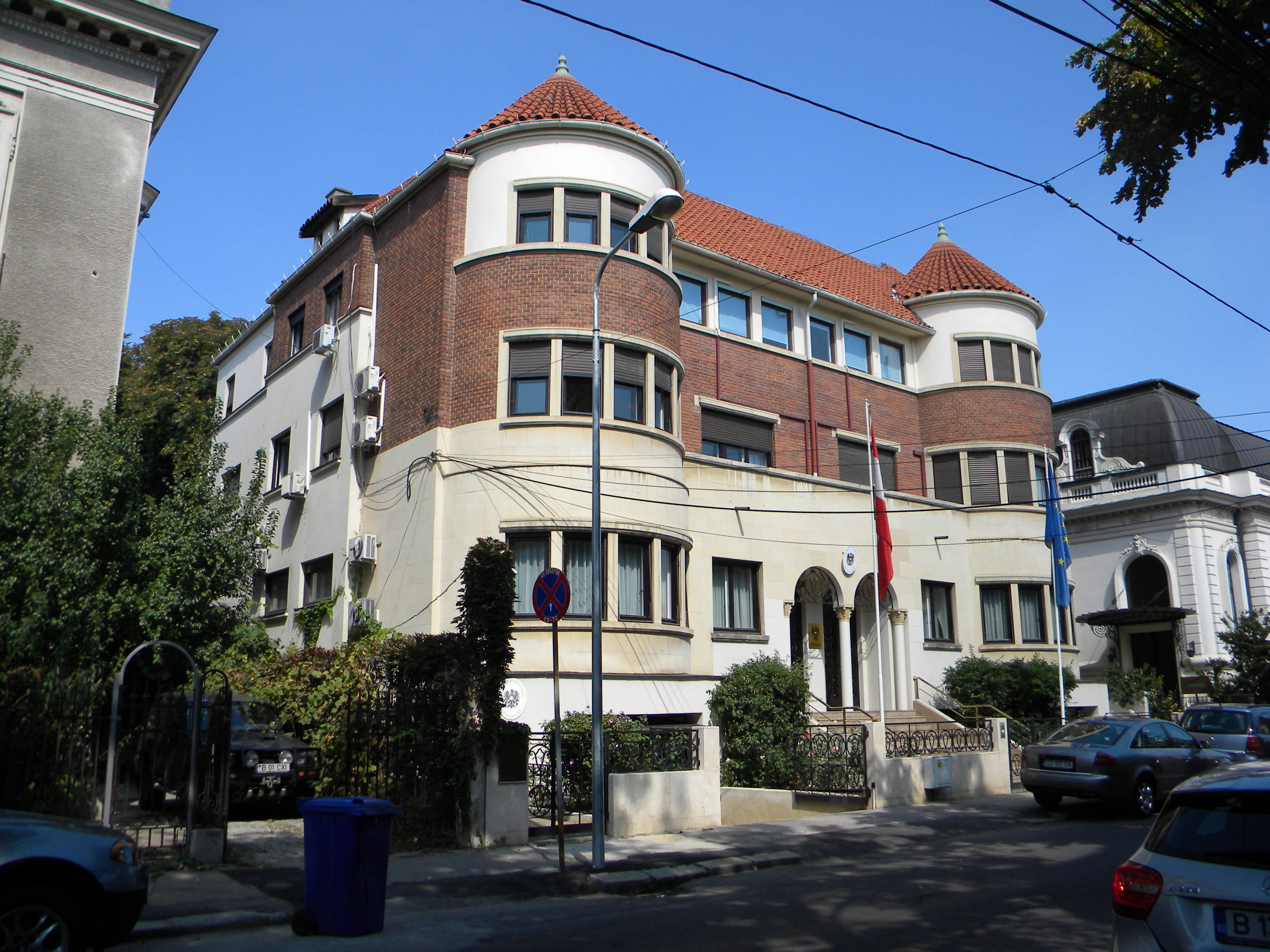 Casa pe Str. Dumbrava Rosie nr. 7, Bucuresti sect. 2